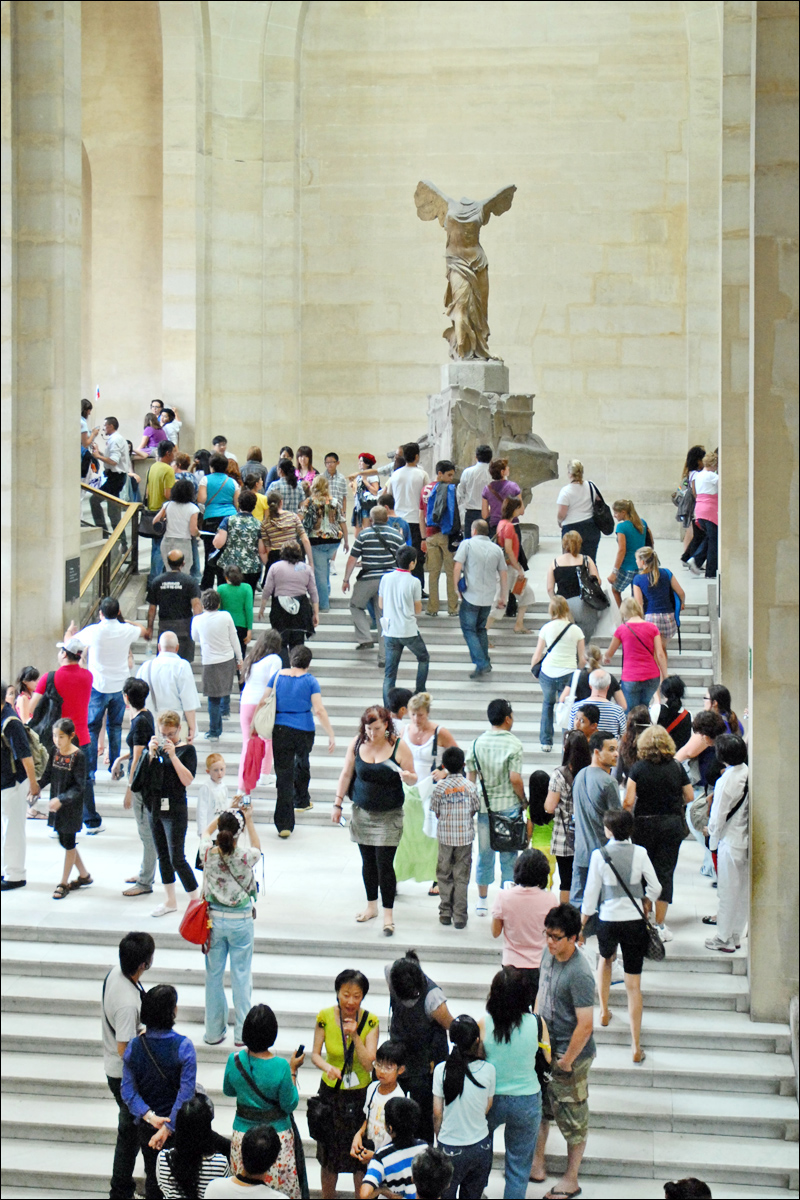 La Victoire de Samothrace est une des oeuvres phares du musée. Le Musée du Louvre a accueilli 8 422 000 visiteurs en 2008 et a maintenu sa fréquentation en 2009 malgré une grève des personnels d'accueil et de surveillance en décembre. Il est le musée le plus fréquenté au monde. La fréquentation quotidienne des collections permanentes et des expositions temporaires du musée s'est élevée à plus de 27.000 visiteurs. Le site internet du musée, a attiré plus de 10,6 millions de visiteurs en 2009, soit une progression de 9,4%.